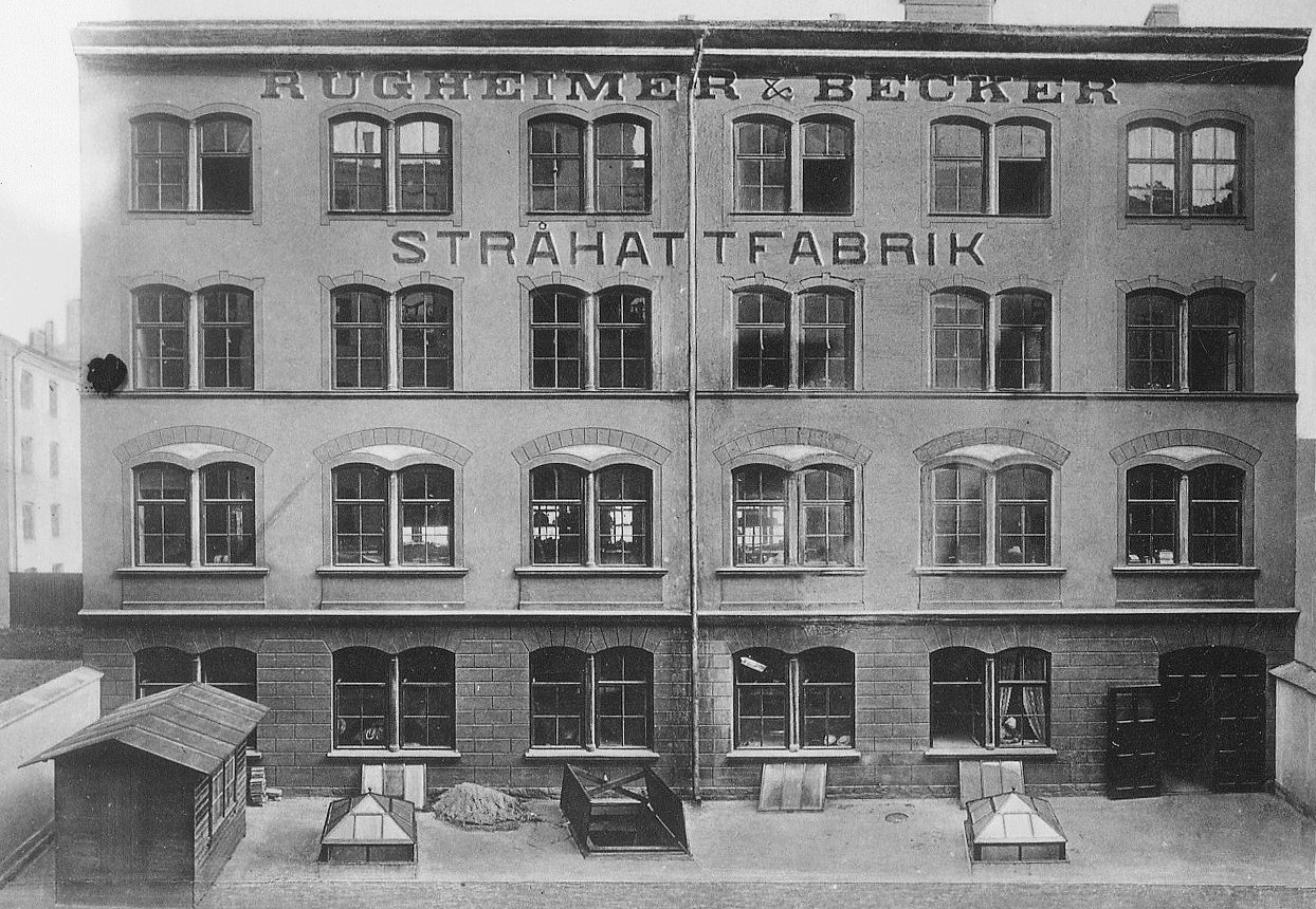 Rügheimer & Beckers stråhattfabrik